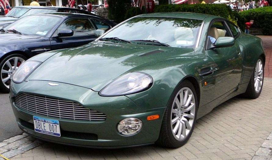 Ванкуиш.